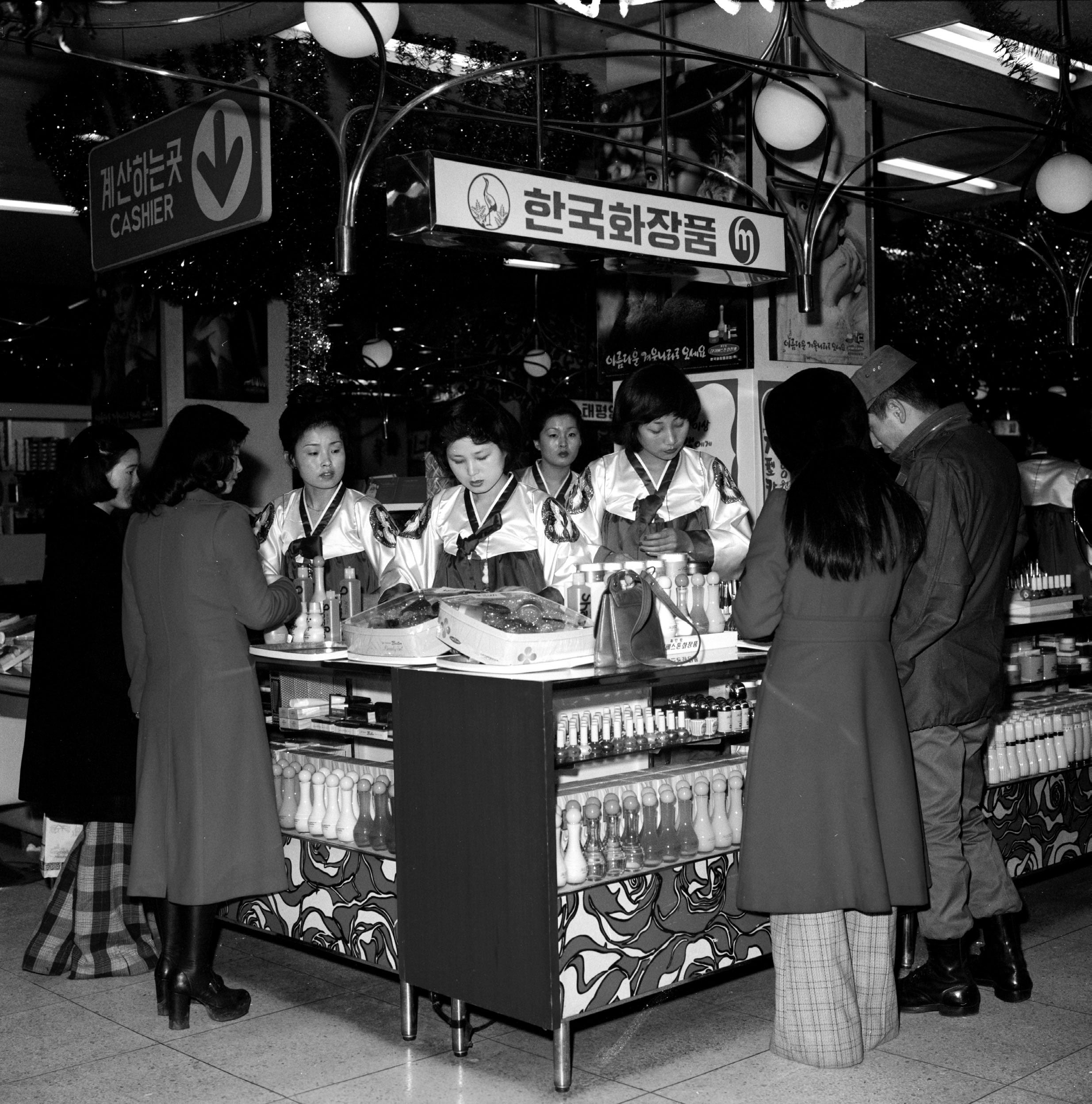 촬영일 : 1975년 12월 24일 촬영장소 : 대한민국 서울 미도파백화점 참석자 : 미상 인물상세정보 : 미상(전체) 관련내용 : 서울 미도파백화점 매장 풍경